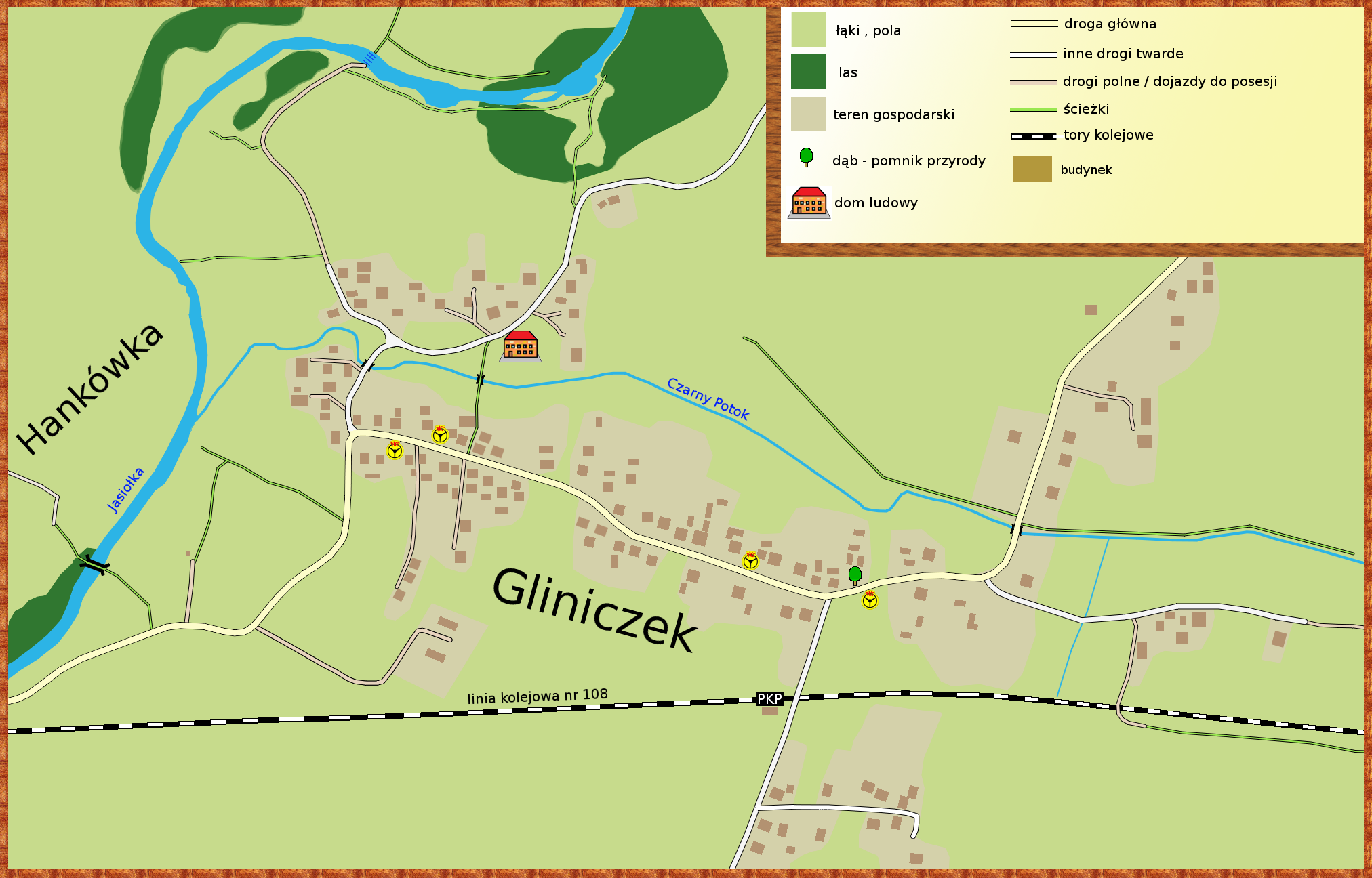 Mapa wsi Gliniczek